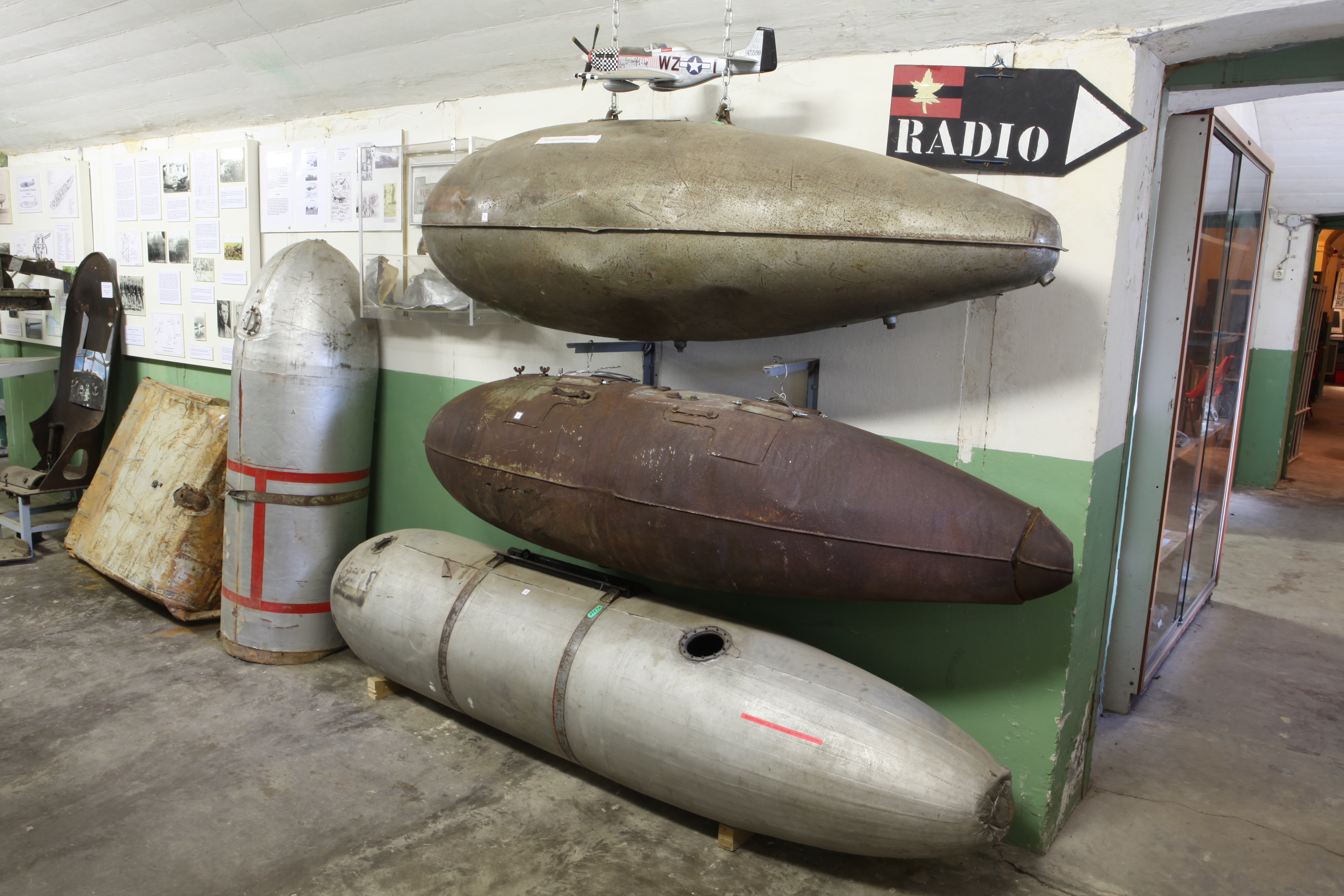 at Luchtoorlogsmuseum Fort bij Veldhuis Genieweg 1 1967 PS HEEMSKERK